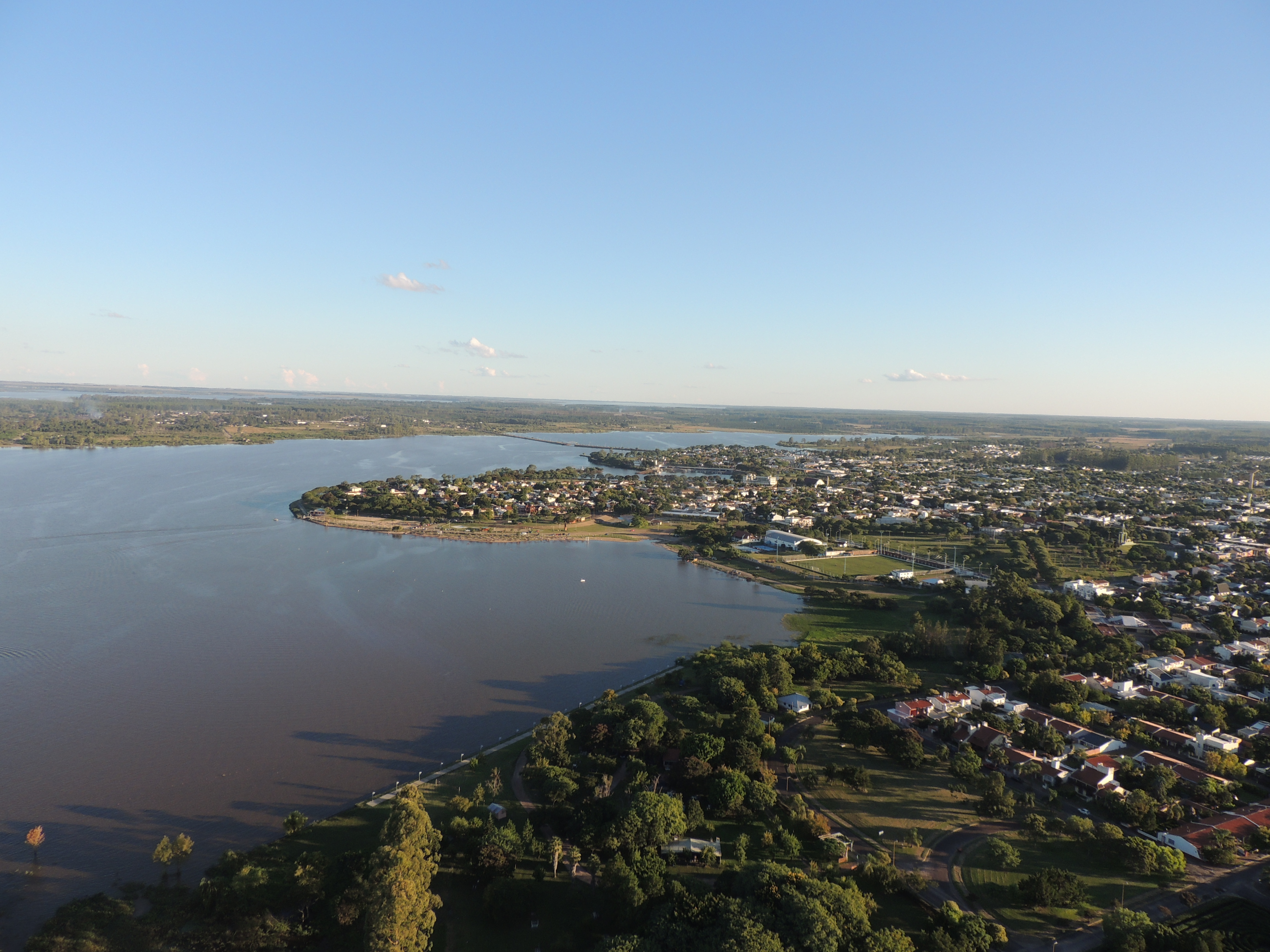 La ciudad de Federación (y el Rio Uruguay) visto desde el aire.